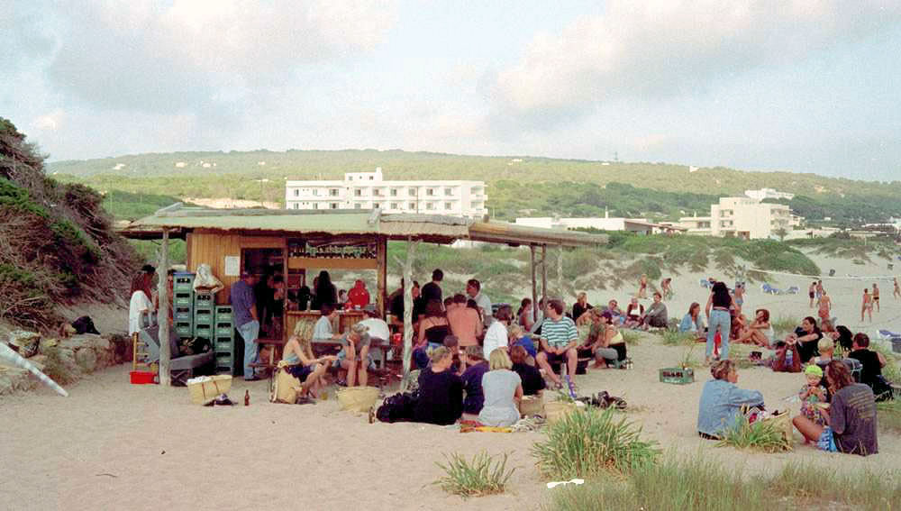 Xiringuito Pirata Bus a la platja de Migjorn, Formentera